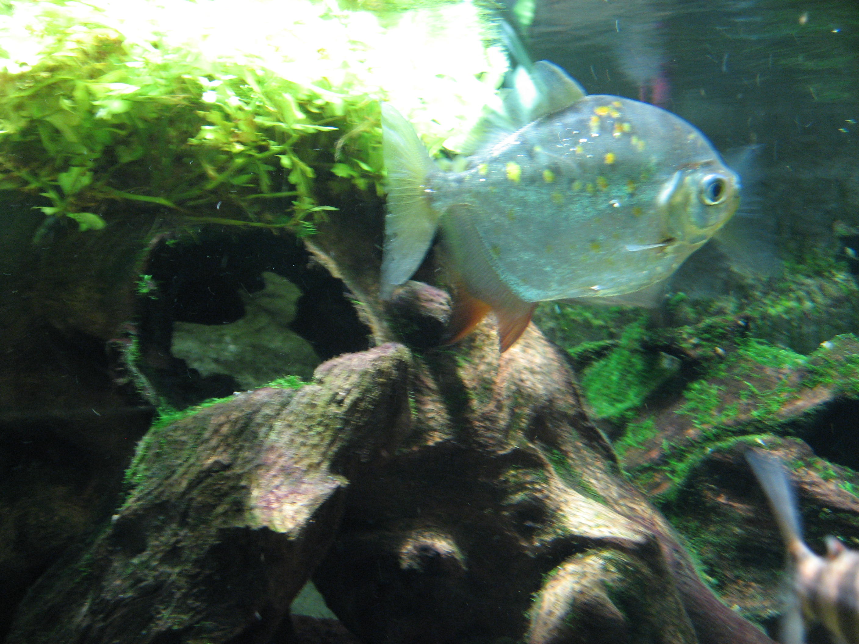 Myloplus rubripinnis in Muséum-aquarium de Nancy Map: 48° 41' 41" N 6° 11' 18" E